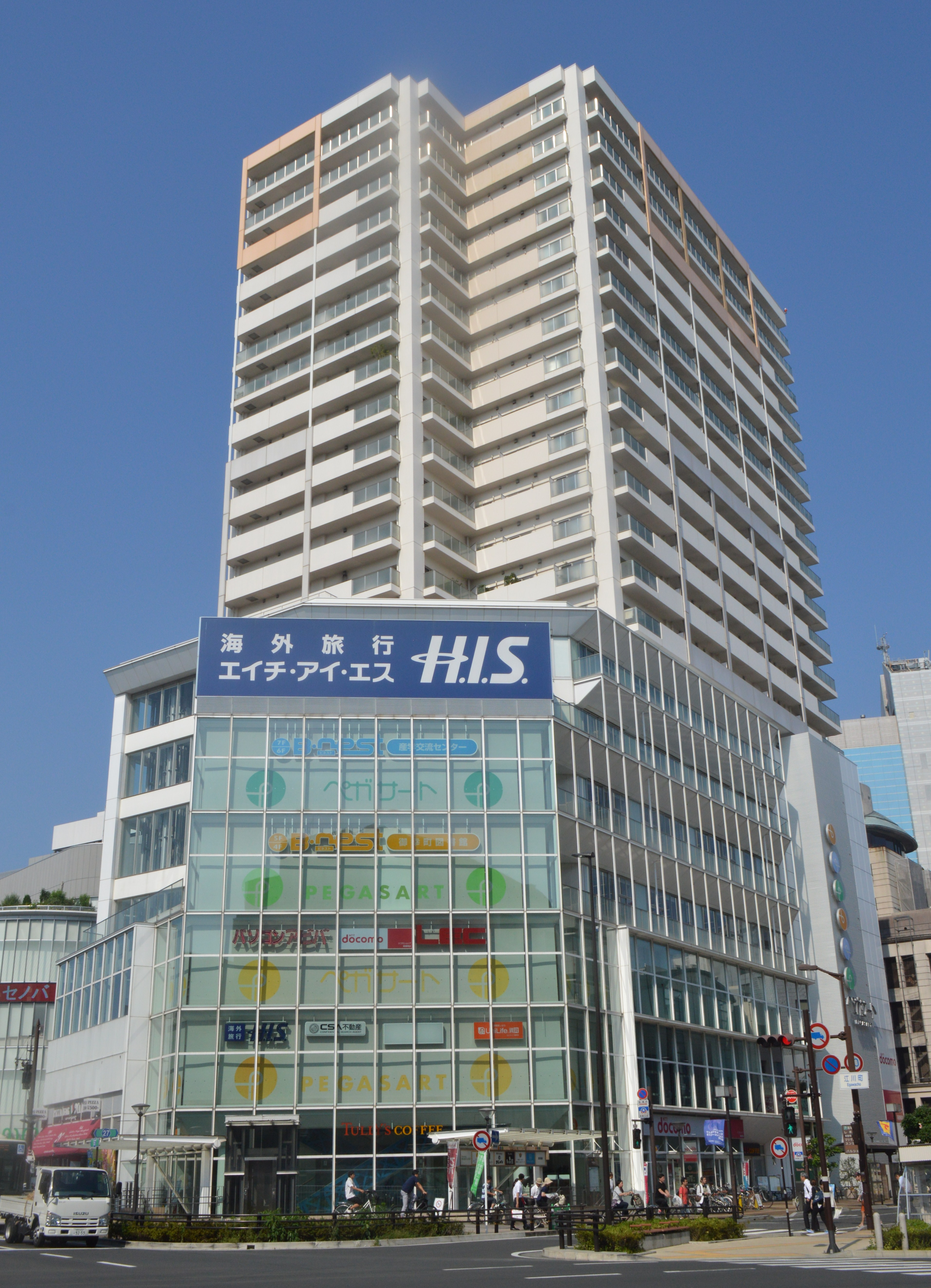 静岡市葵区御幸町にある複合ビル「ペガサート」。静岡鉄道新静岡駅すぐ。